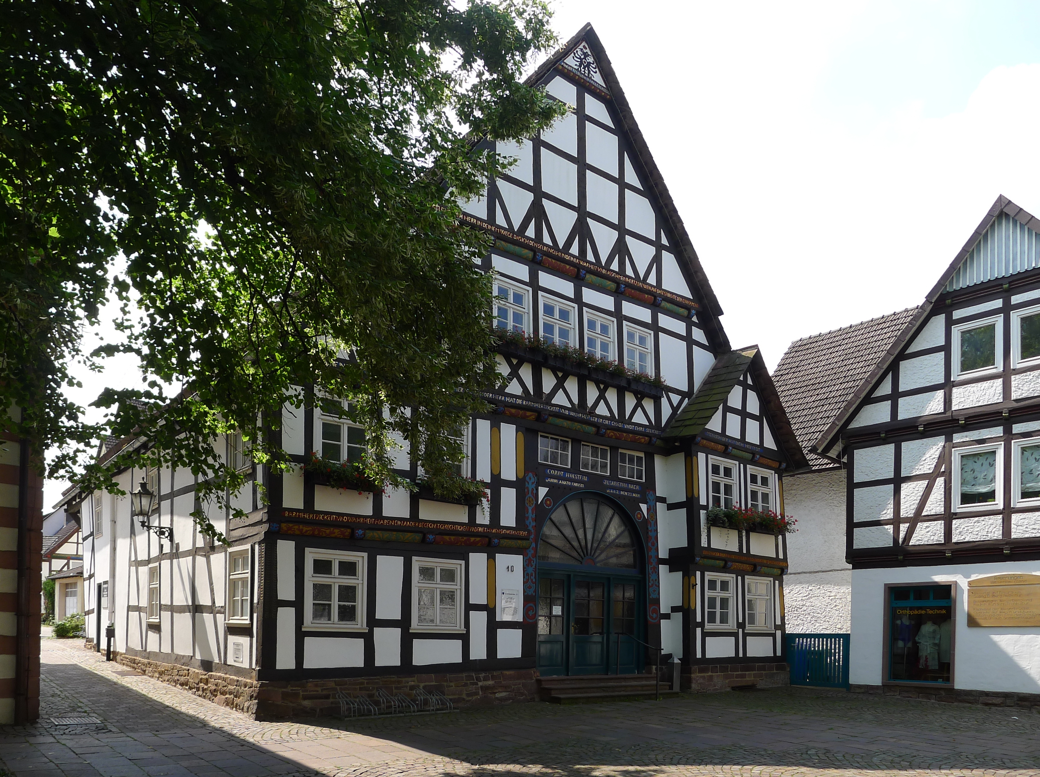 Cordt-Holstein-Haus am Kellerplatz, heute Stadtverwaltung